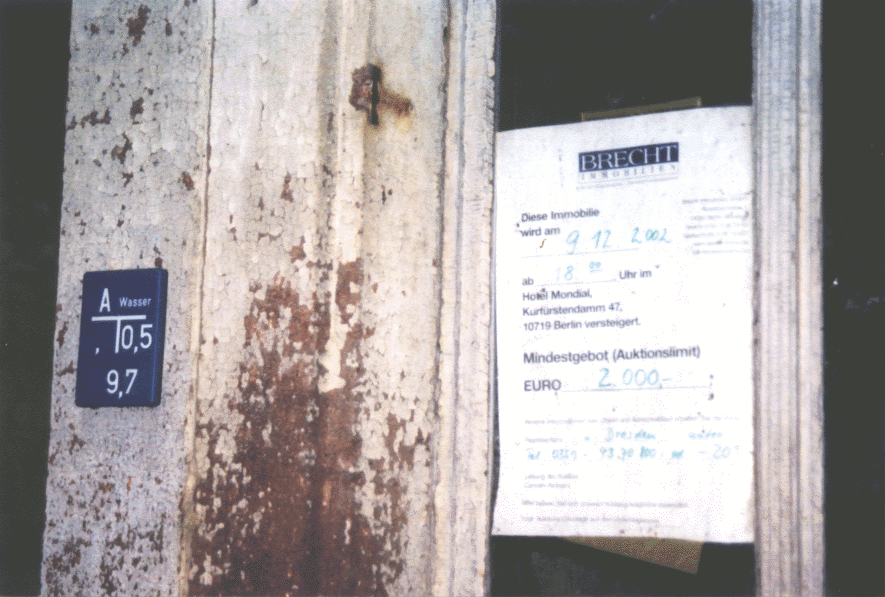 Zu versteigernde Immobilie in Rochlitz